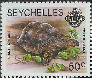 Timbre 378 Seychelles.